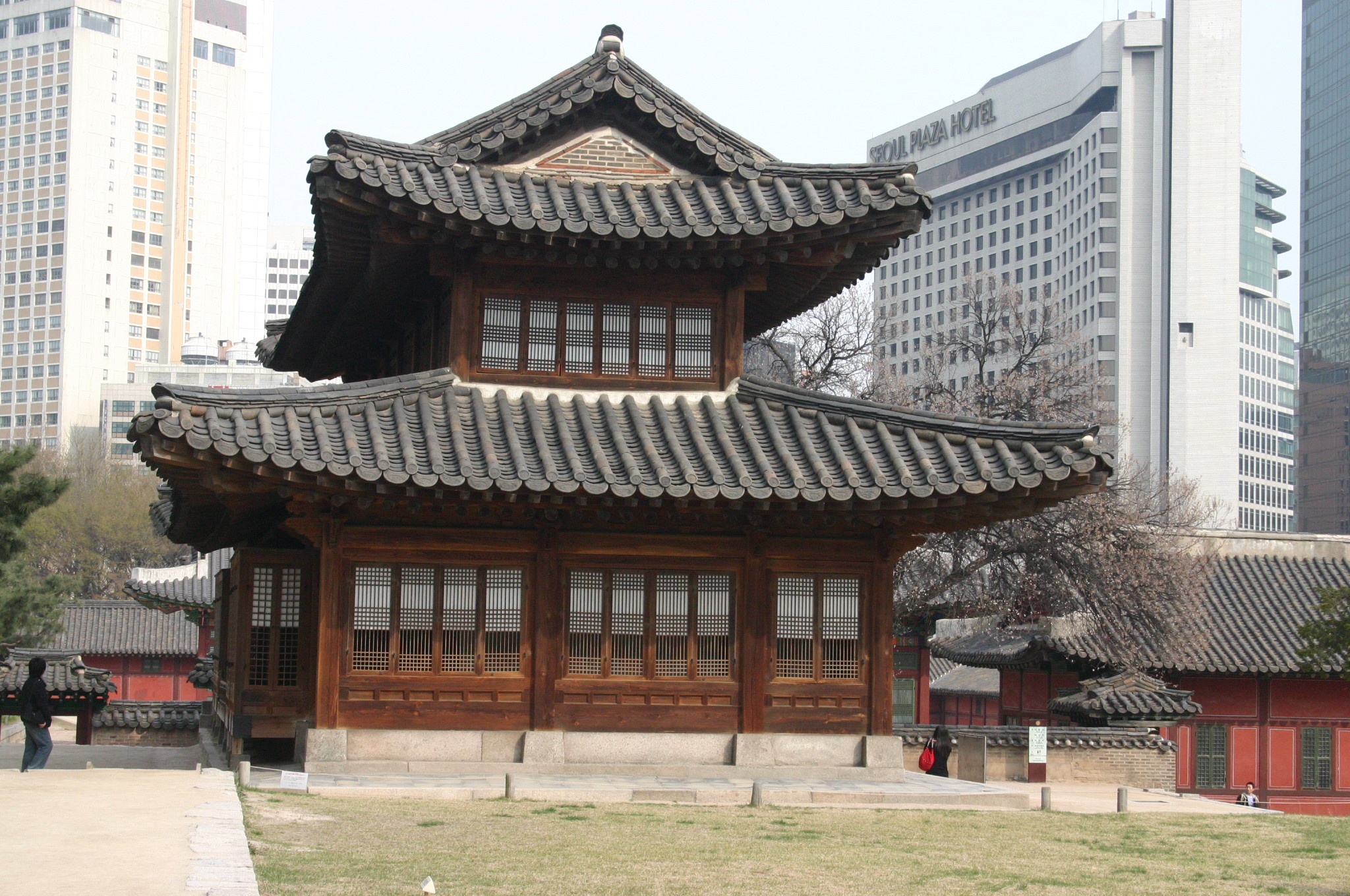 Deoksugung (Deoksu Palace) in Seoul, Korea.